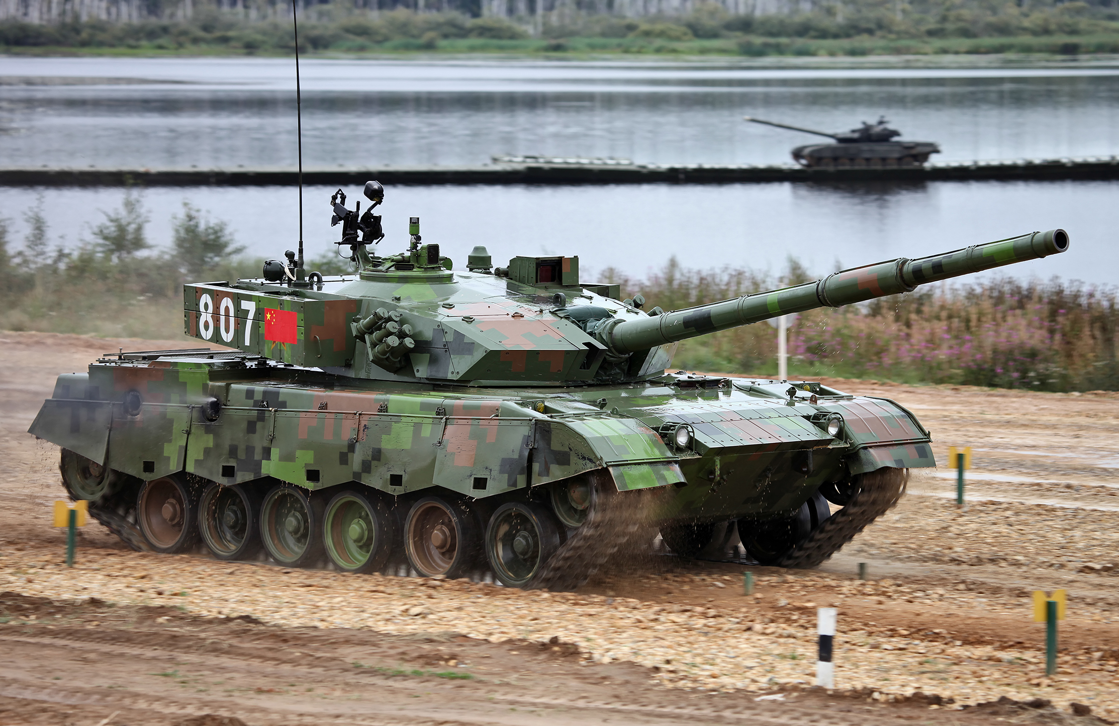 96A (ZTZ-96A) 坦克参加俄罗斯"坦克两项-2014"比赛。